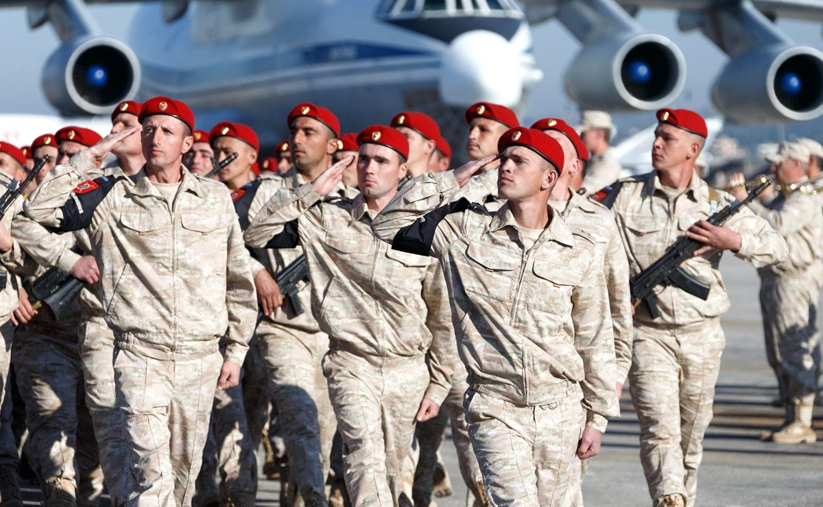 Во время посещения Президентом России Владимиром Путиным авиабазы Хмеймим в Сирии.